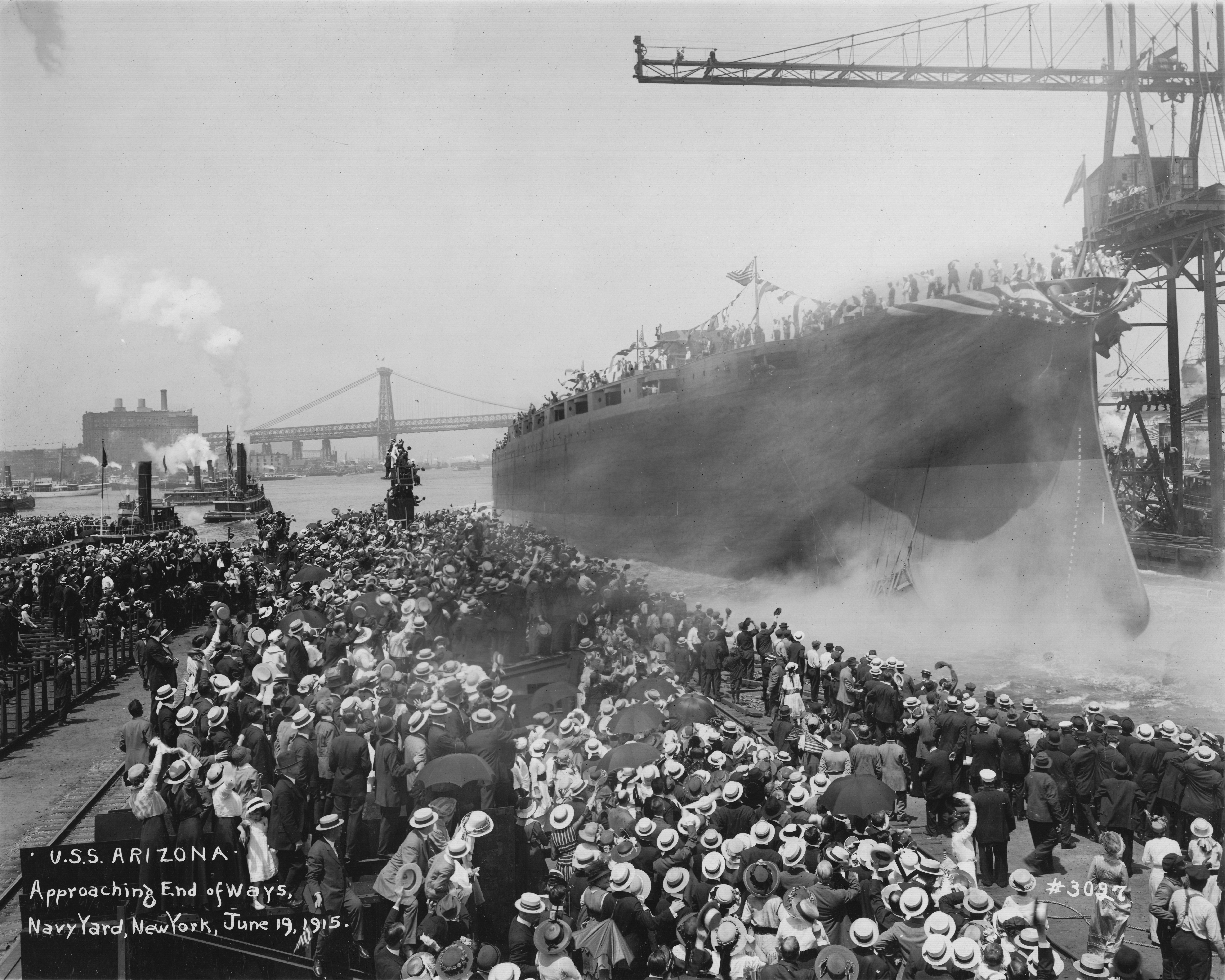 USS Arizona being launched in 1915.